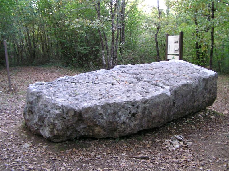 Dolmen de la forêt de Boixe en Charente, dite "pierre du sacrifice"